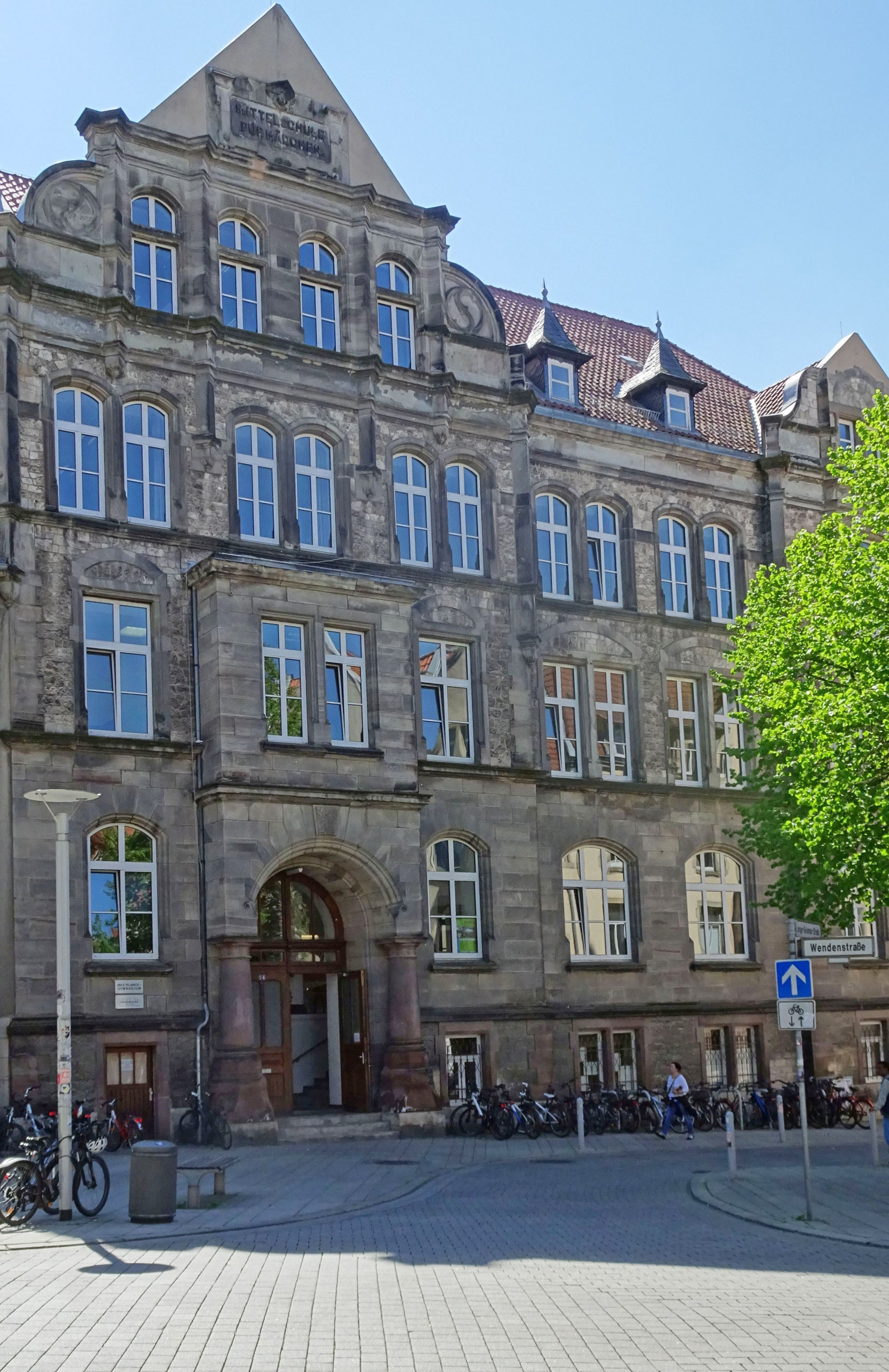 Gebäude des Max-Planck-Gymnasiums am Albanikirchhof in Göttingen.